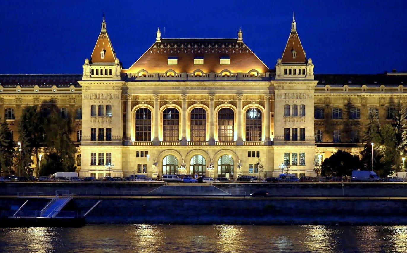 Műegyetem Központi Épület